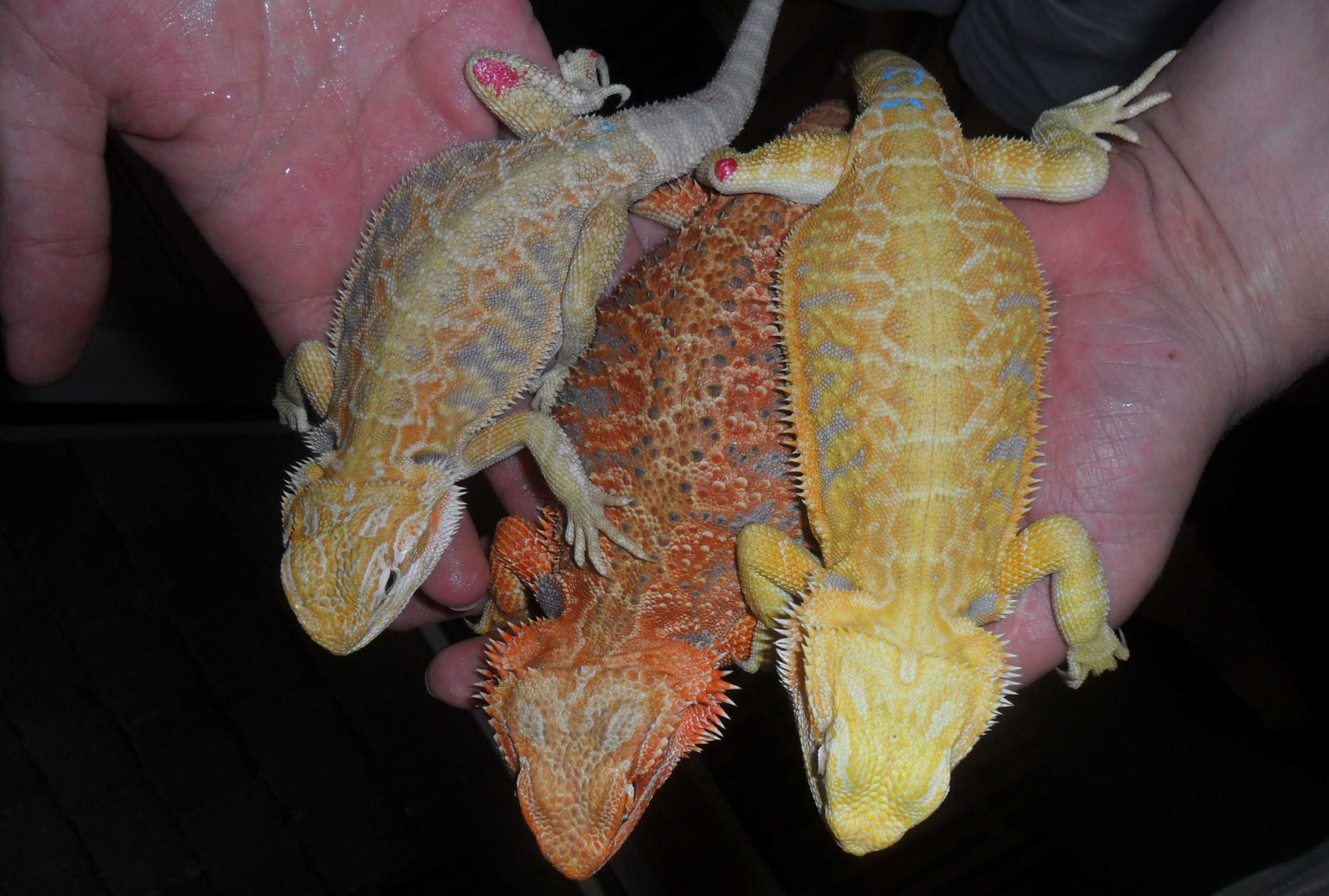 voorbeeld kleuren baardagaam